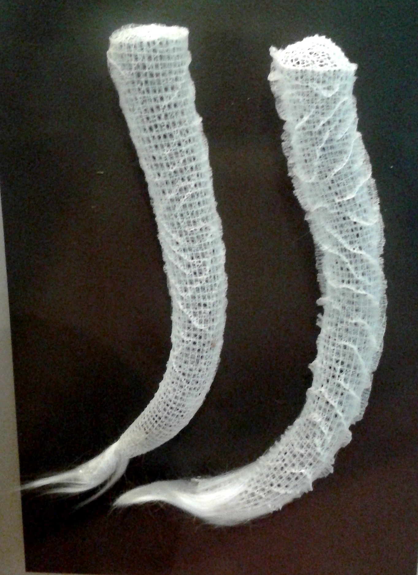 Euplectella SP. Origem desconhecida. Esponja de vidro (Hexactinellida) que só se encontra em grandes profundidades, também conhecida como cesto-de-flores-de-vênus. Acervo do Museu Nacional/UFRJ - Rio de Janeiro, RJ, Brasil.